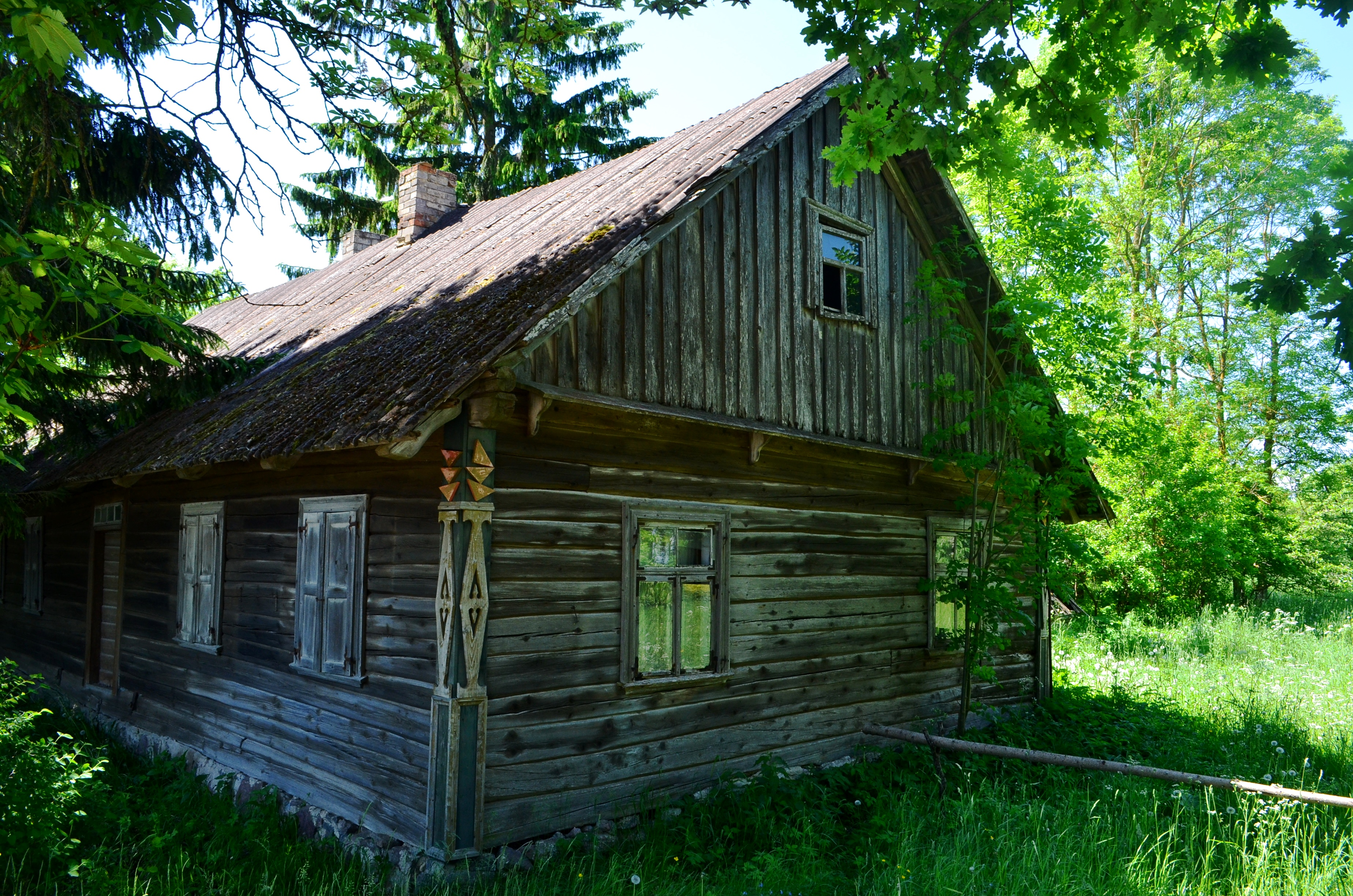 Senovinė gryčia Binėnuose, Pakruojo raj.